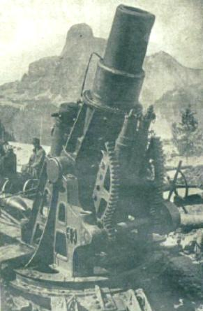 Avstro-ogrski 305 cm možnar v Pustrskih alpah.